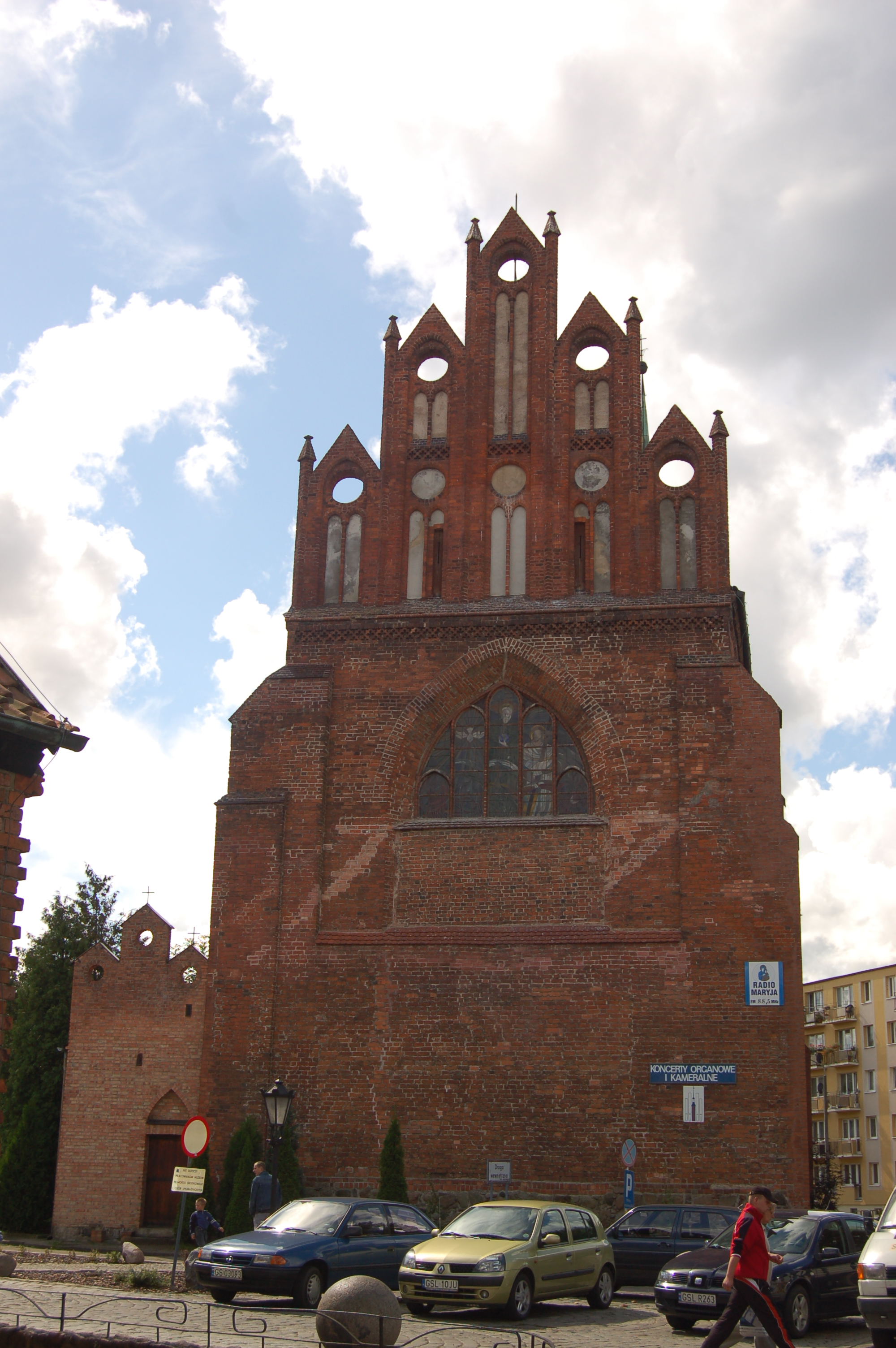 Słupsk, ul. Dominikańska 3 - dawny kościół klasztorny dominikanów (zamkowy, przed 1945 p.w. św. Jana Chrzciciela), obecnie rzymskokatolicki kościół parafialny pw. św. Jacka, 1 poł. XV, 1602, 1777-1779, 1875, 1892,1900, 1946